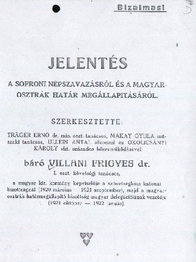 villani_bericht1921 Baro Villani Frigyes dr